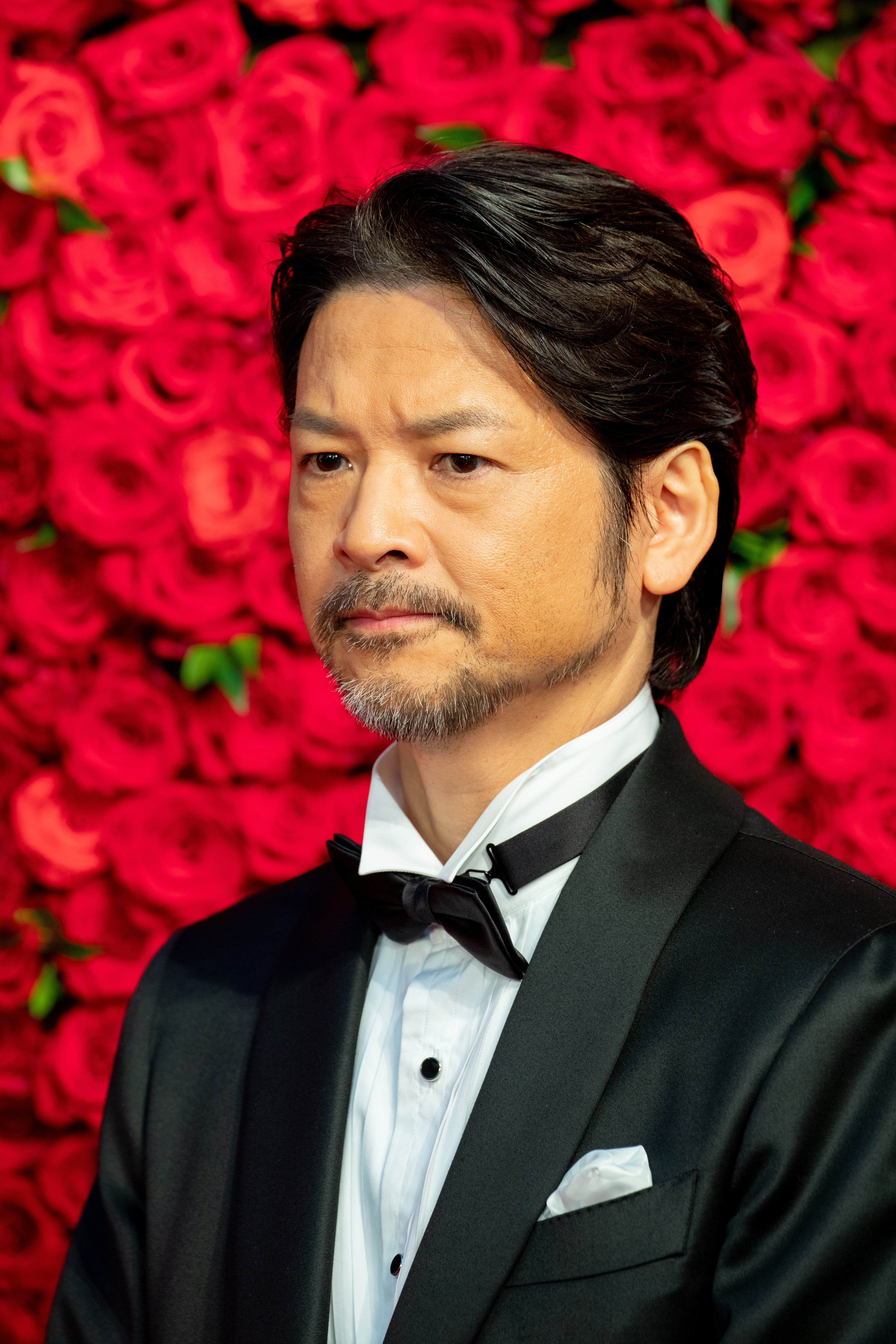 第30回 東京国際映画祭 オープニングセレモニー 緒形直人 (えちてつ物語～わたし、故郷に帰ってきました。～)